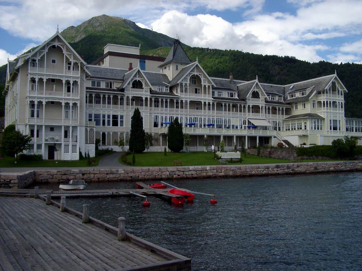 Balestrand